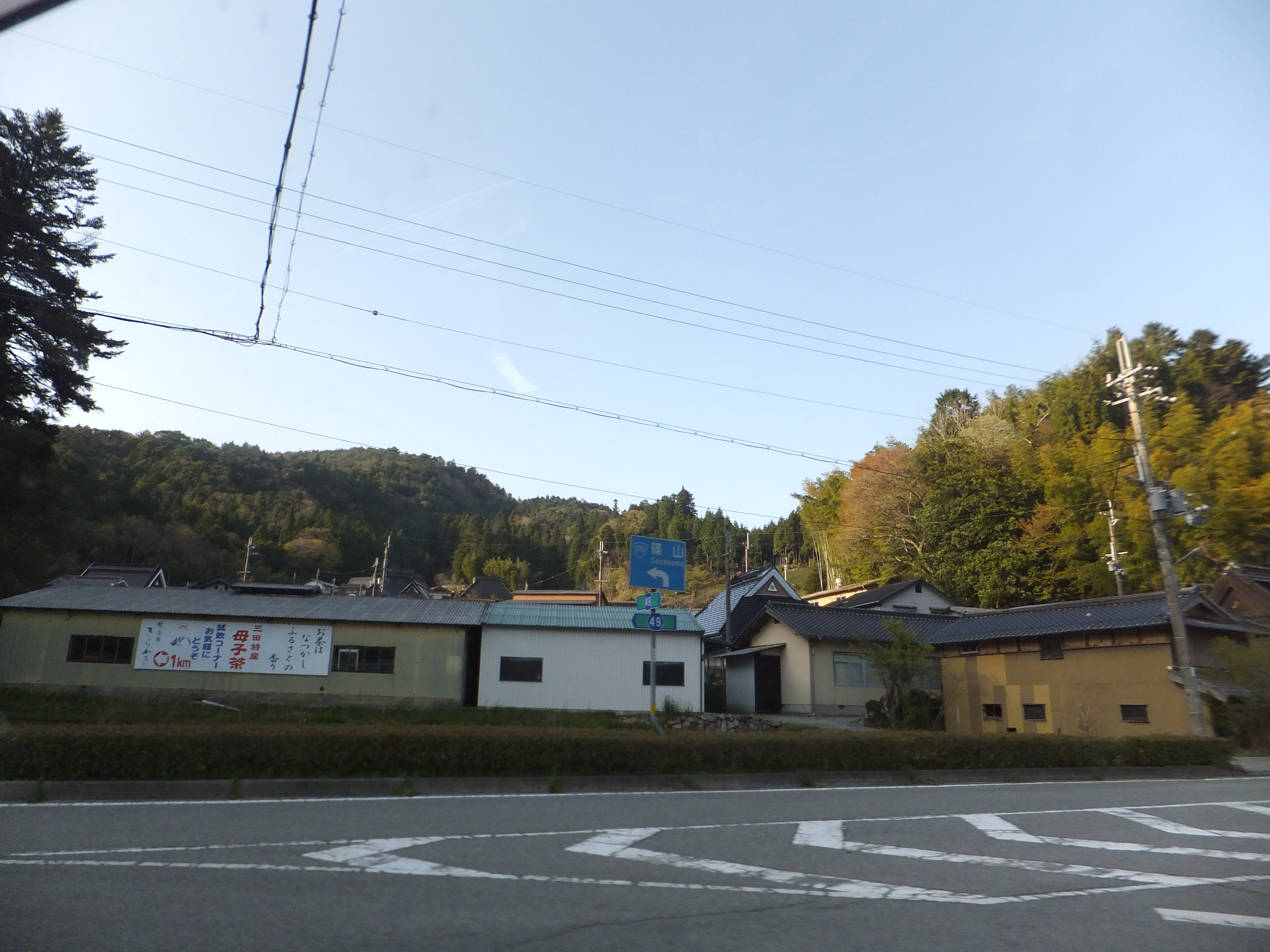 兵庫県三田市母子